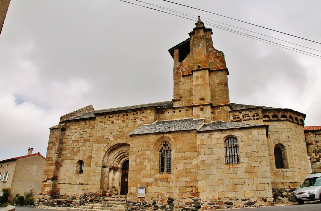 église St Haon